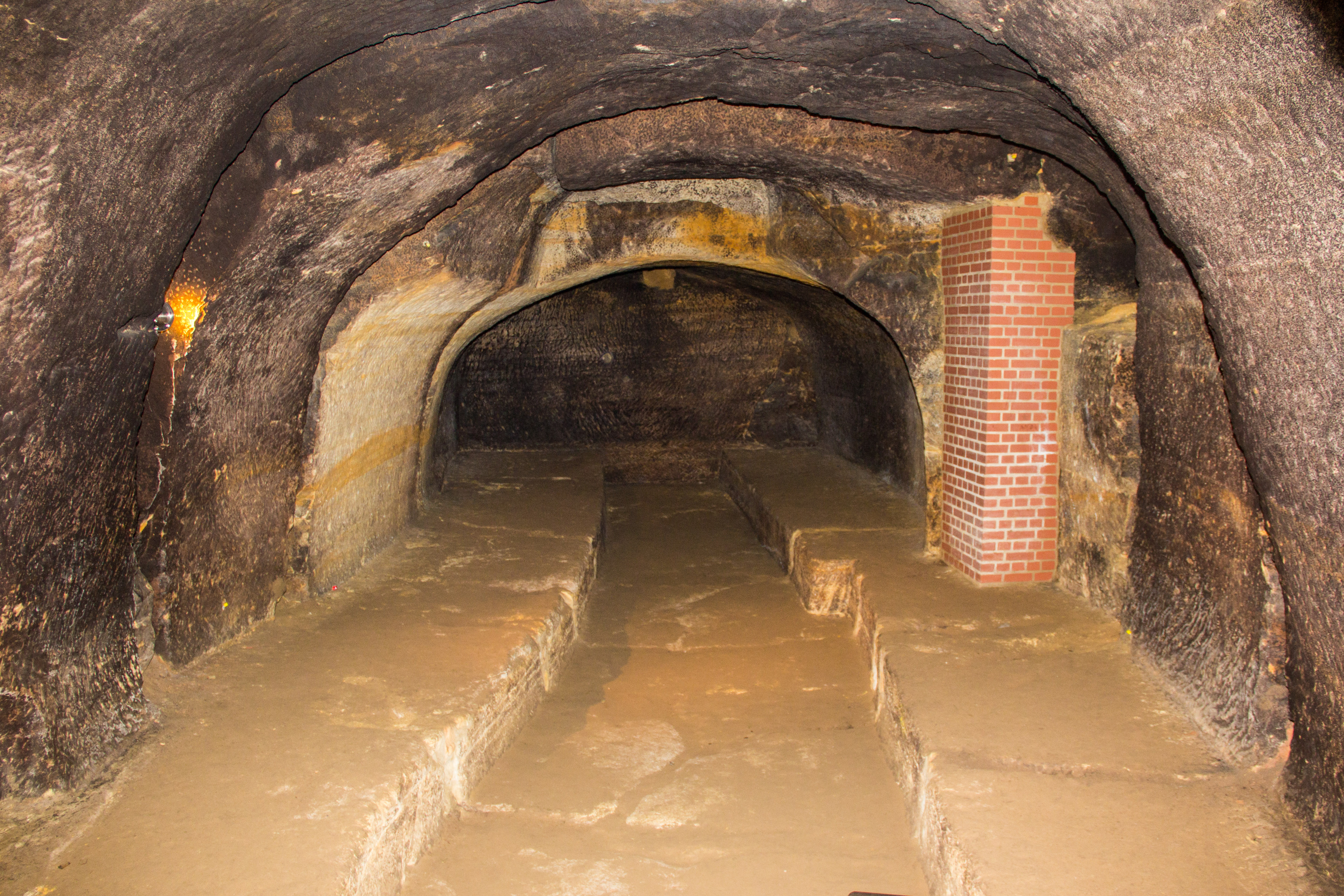 Felsenkeller, Schwandorf, Baudenkmal, Geotop